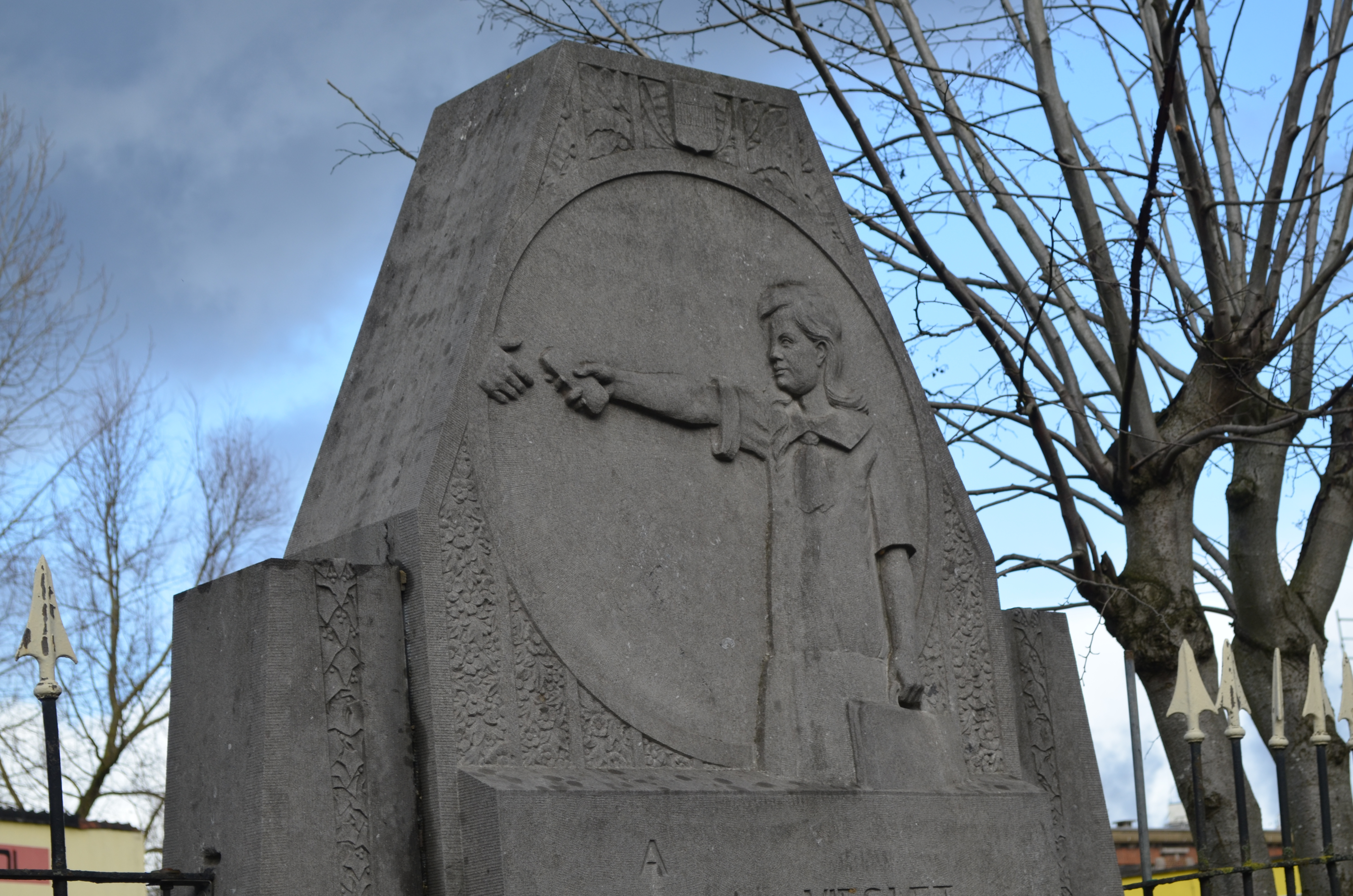 Marchienne-au-Pont (Charleroi-Belgique) - monument à l'endroit ou Yvonne Vieslet, âgée de 10 ans, fut atteinte le 12 octobre 1918 par une balle tirée par un soldat allemand.